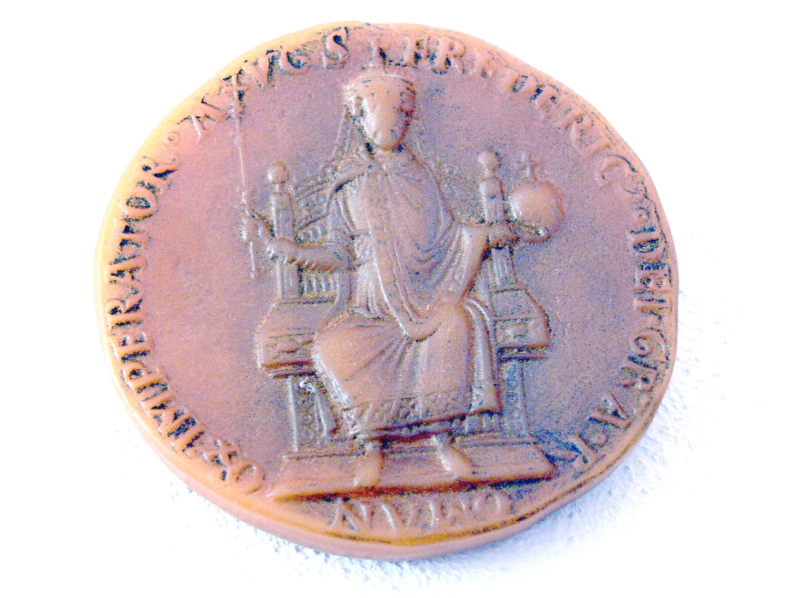 Siegel von Kaiser Friedrich I. Barbarossa 1157